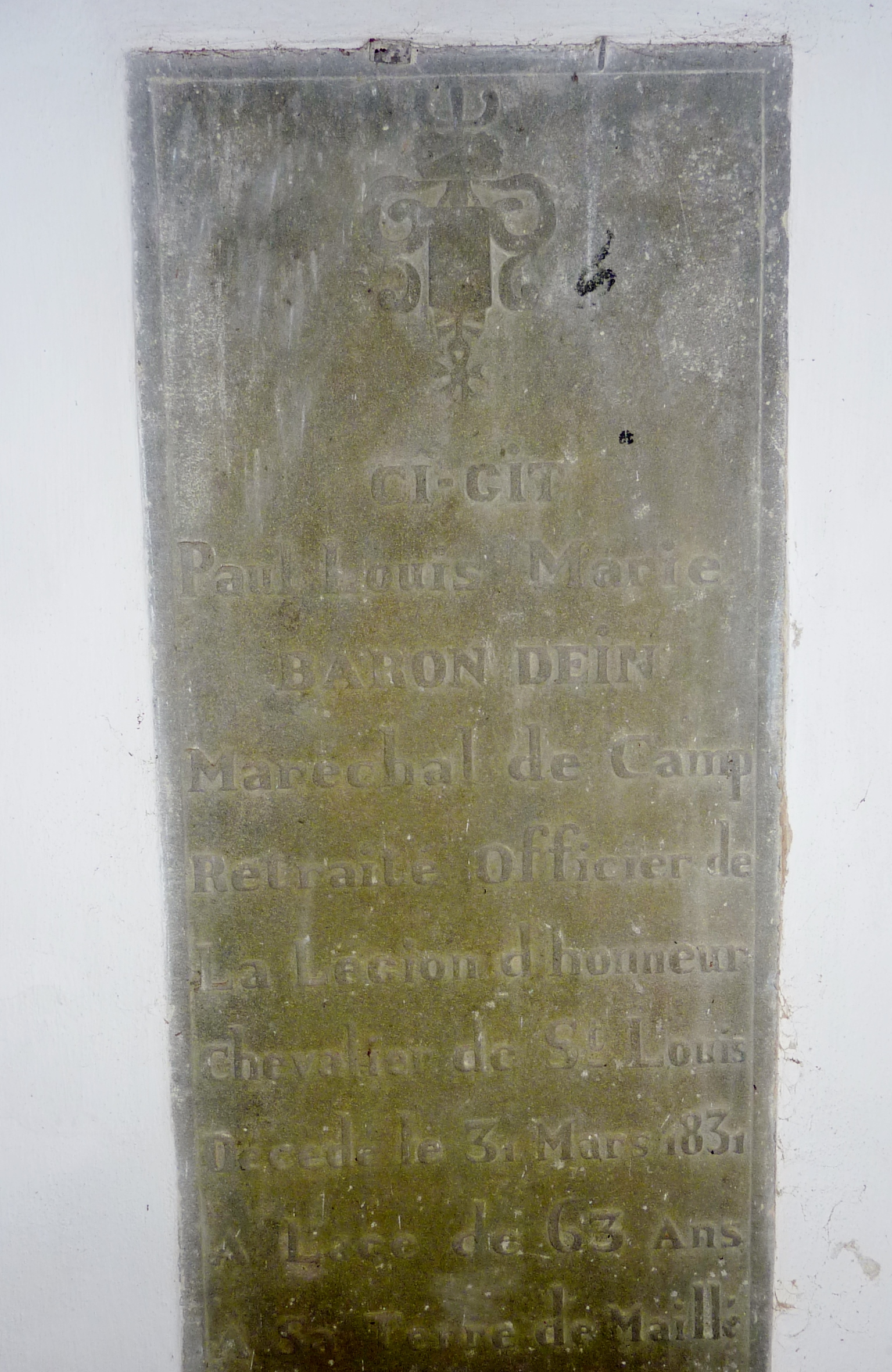 Château de Maillé (Plounévez-Lochrist) : pierre tombale du baron Paul Dein, décédé en 1831 , qui fut propriétaire du château (elle se trouve dans la chapelle du château)